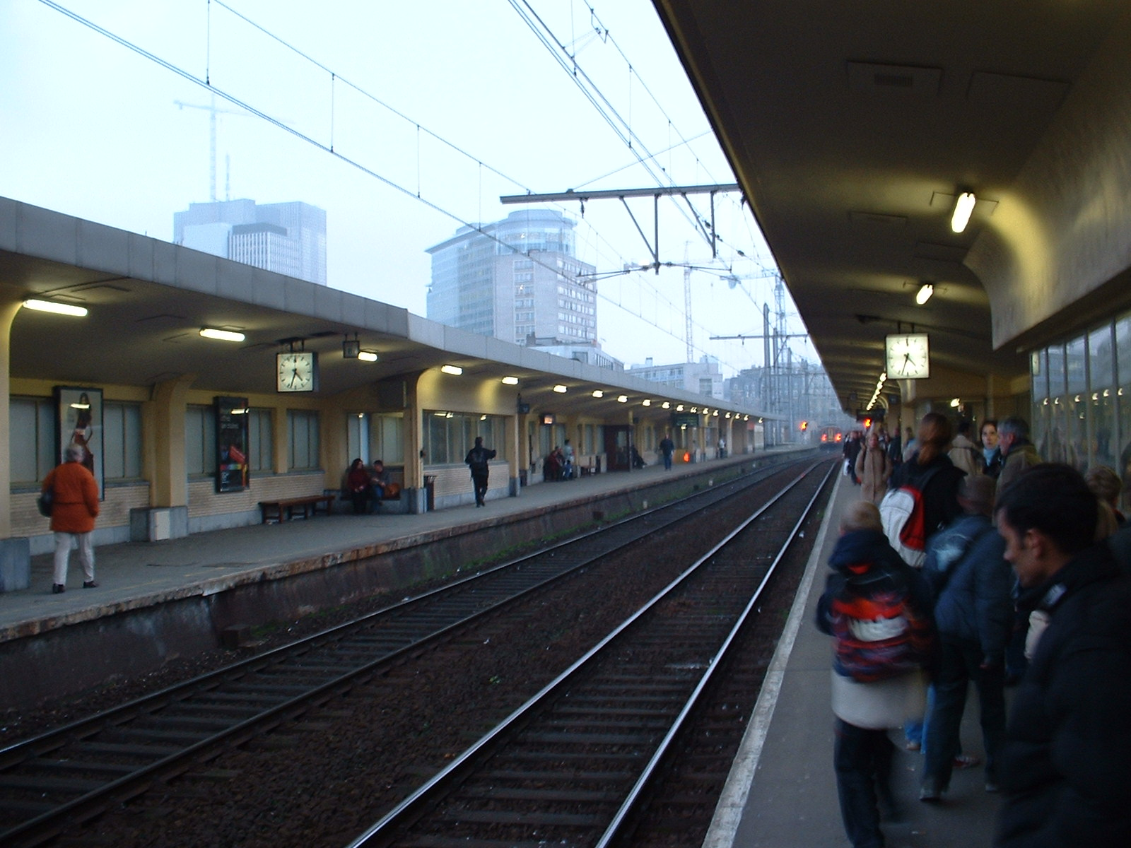 Gare du Nord, Bruxelles